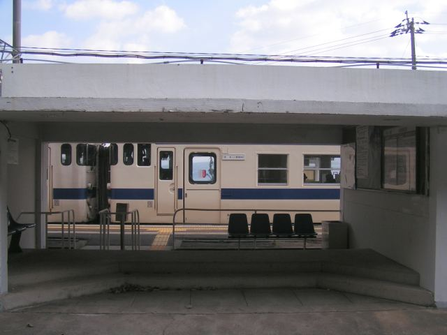 竜ヶ水駅駅舎